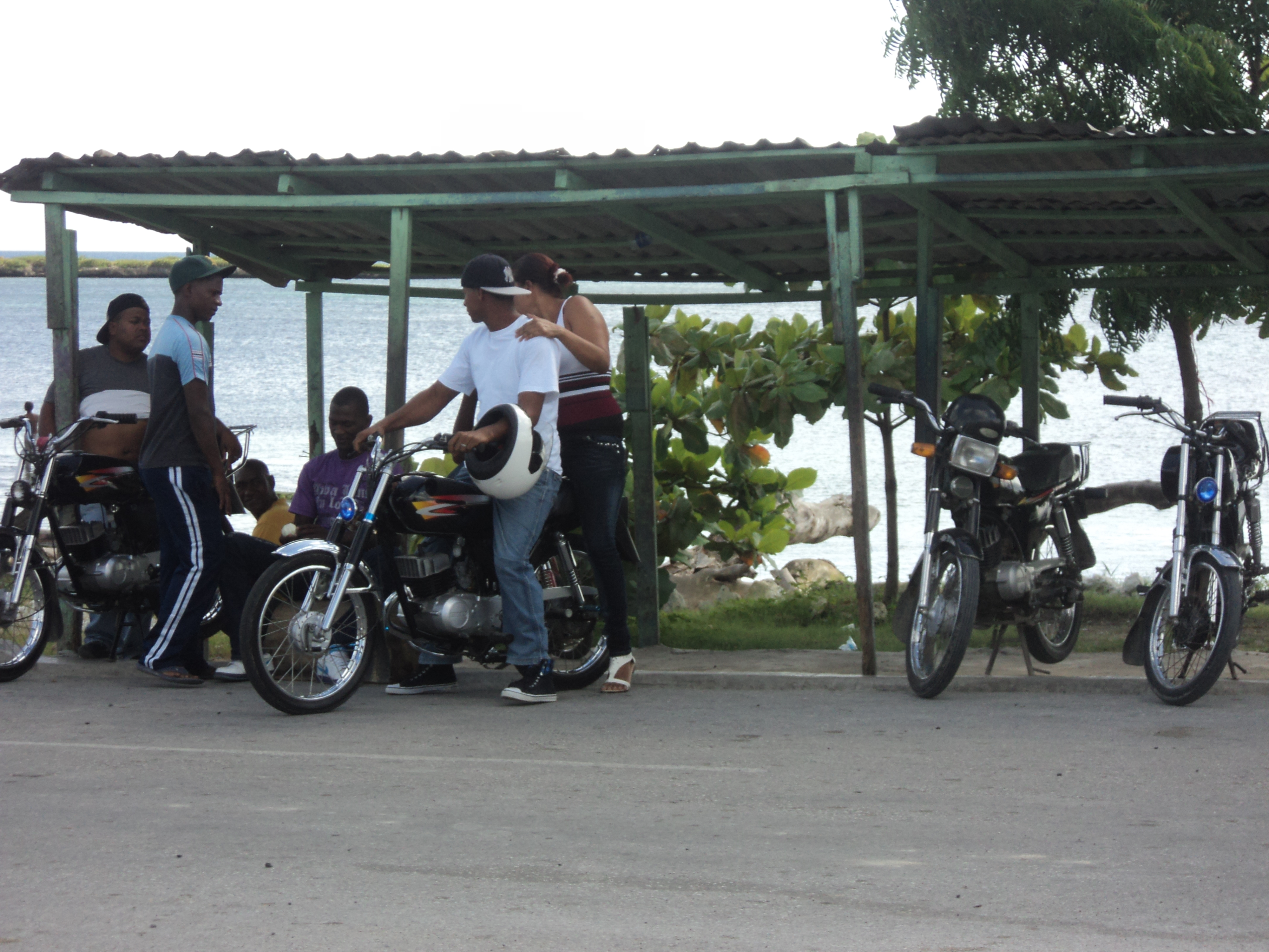 barrio la piedra, san pedro de macorís, republica dominicana